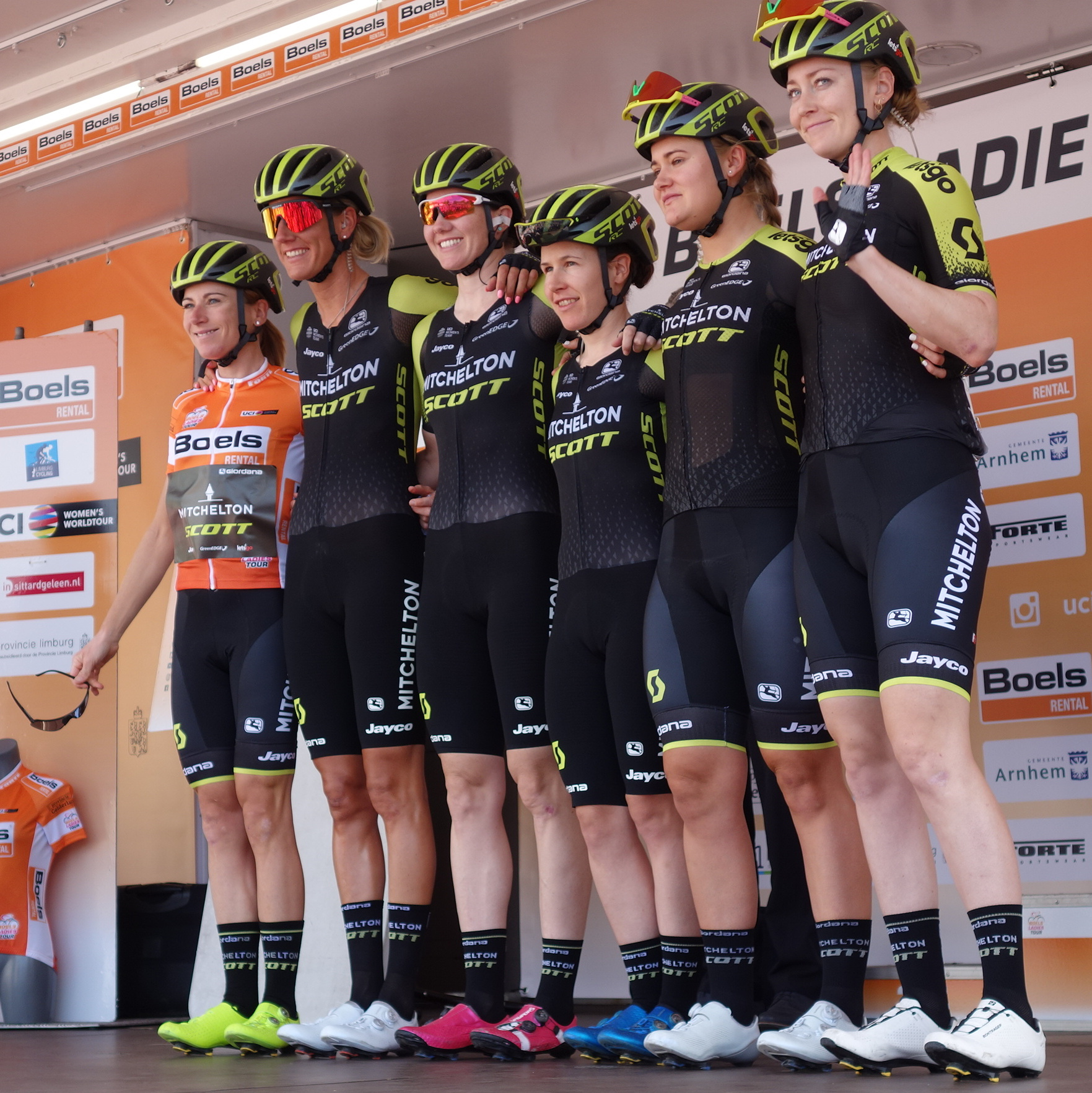 Mitchelton-Scott bij de start van de eerste etappe van Stramproy naar Weert in de Boels Ladies Tour 2019